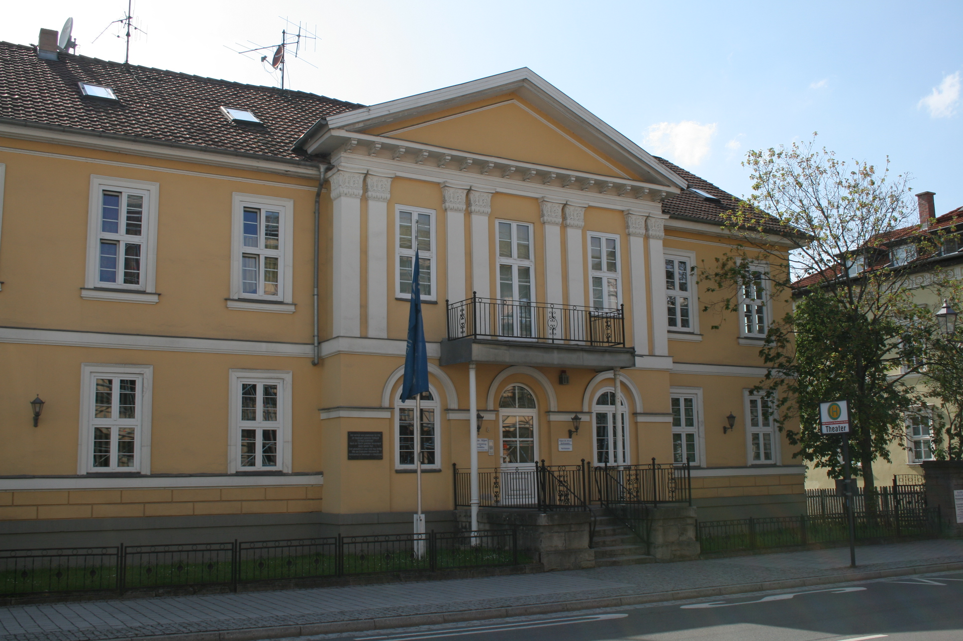 Wohnhaus und Praxis (bis 1938) von Paul Oestreicher in Meiningen